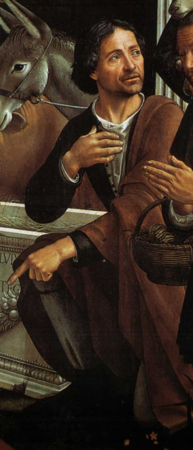 Autoritratto del ghirlandaio, adorazione dei pastori, cappella sassetti